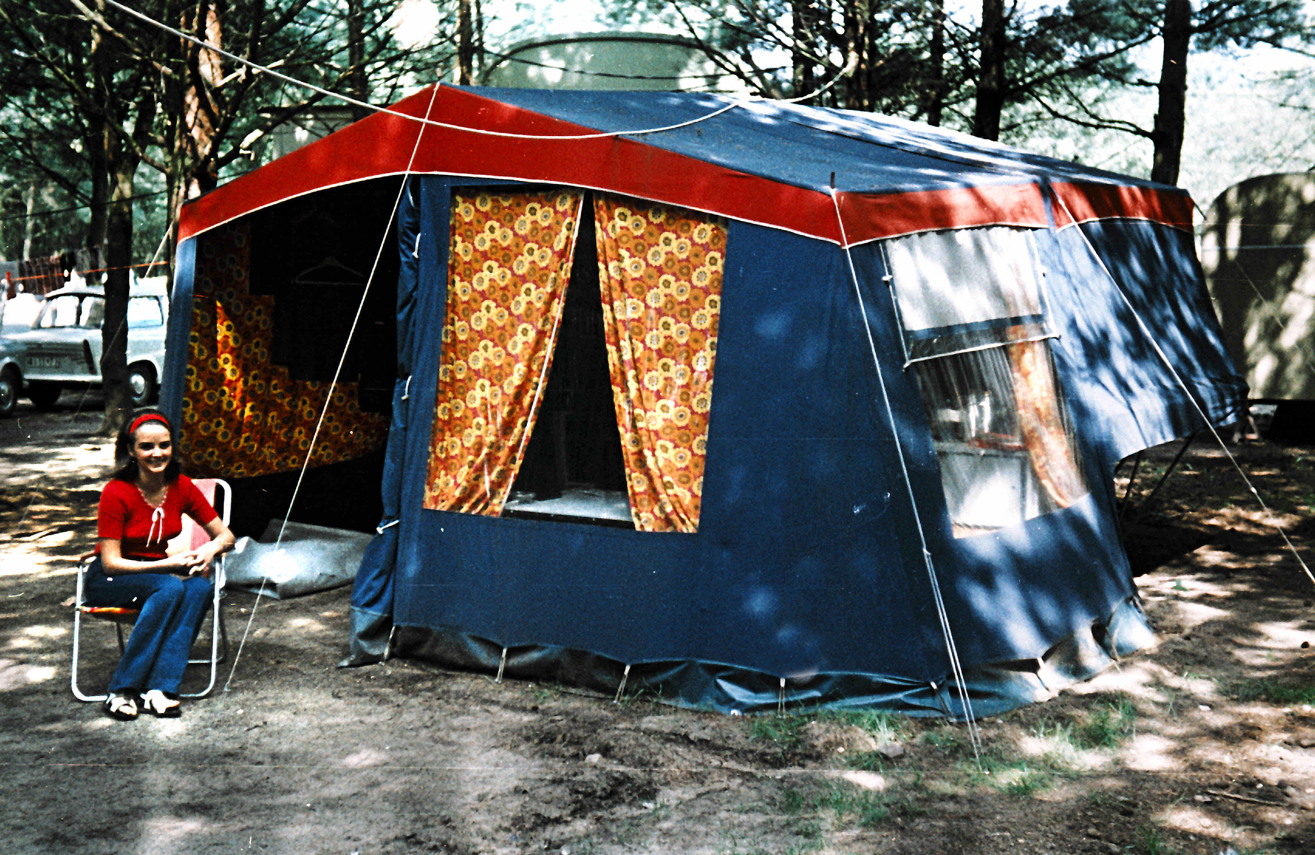 22.08.1972 DDR 2221 [17440] Zeltplatz Lütow (GMP: 54.011400,13.859081) Post Neuendorf am Achterwasser (Insel Usedom, Ostsee): Klappfix-Campinganhänger, gebaut im VEB Fahrzeugwerk Olbernhau. Urlaubsplatz der ZBE Agrobau Dresden. Hier aufgebaut mit Vorzelt. Dahinter befindet sich der aufgeklappte Autoanhänger mit Doppelbett und Küchenzeile. [F19720822A007.JPG]19720822100NR.JPG(c)Blobelt